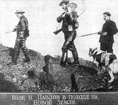 Географ В.Визе (впереди) и геолог М.Павлов (в центре) в походе по Новой Земле в составе экспедиции Г.Я.Седова к Северному полюсу. 1913 г.